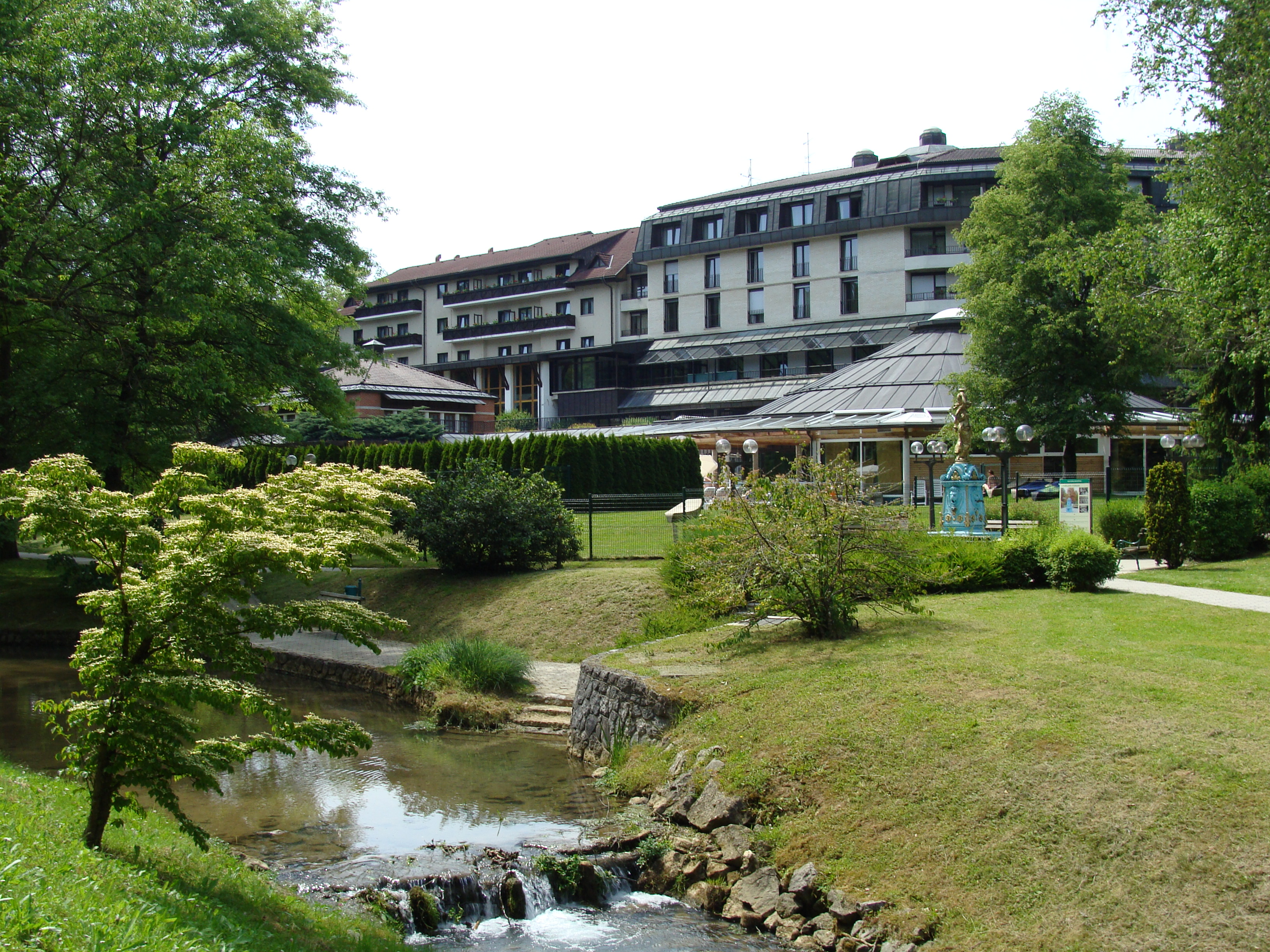 Terme Šmarješke Toplice